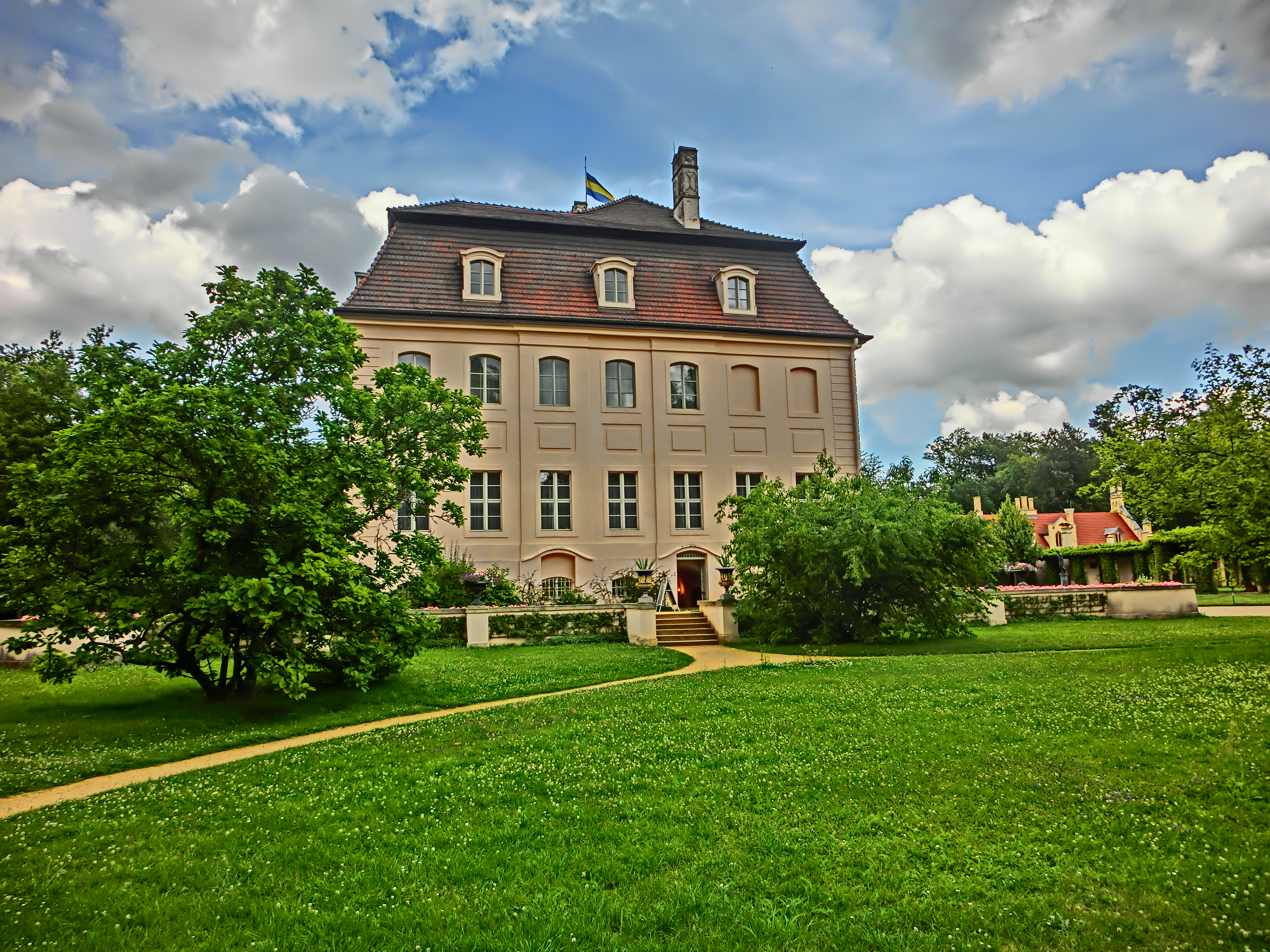 Schloss Branitz von Süden aus Juli 2014